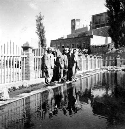 بوکان، قلعه سردار و استخر